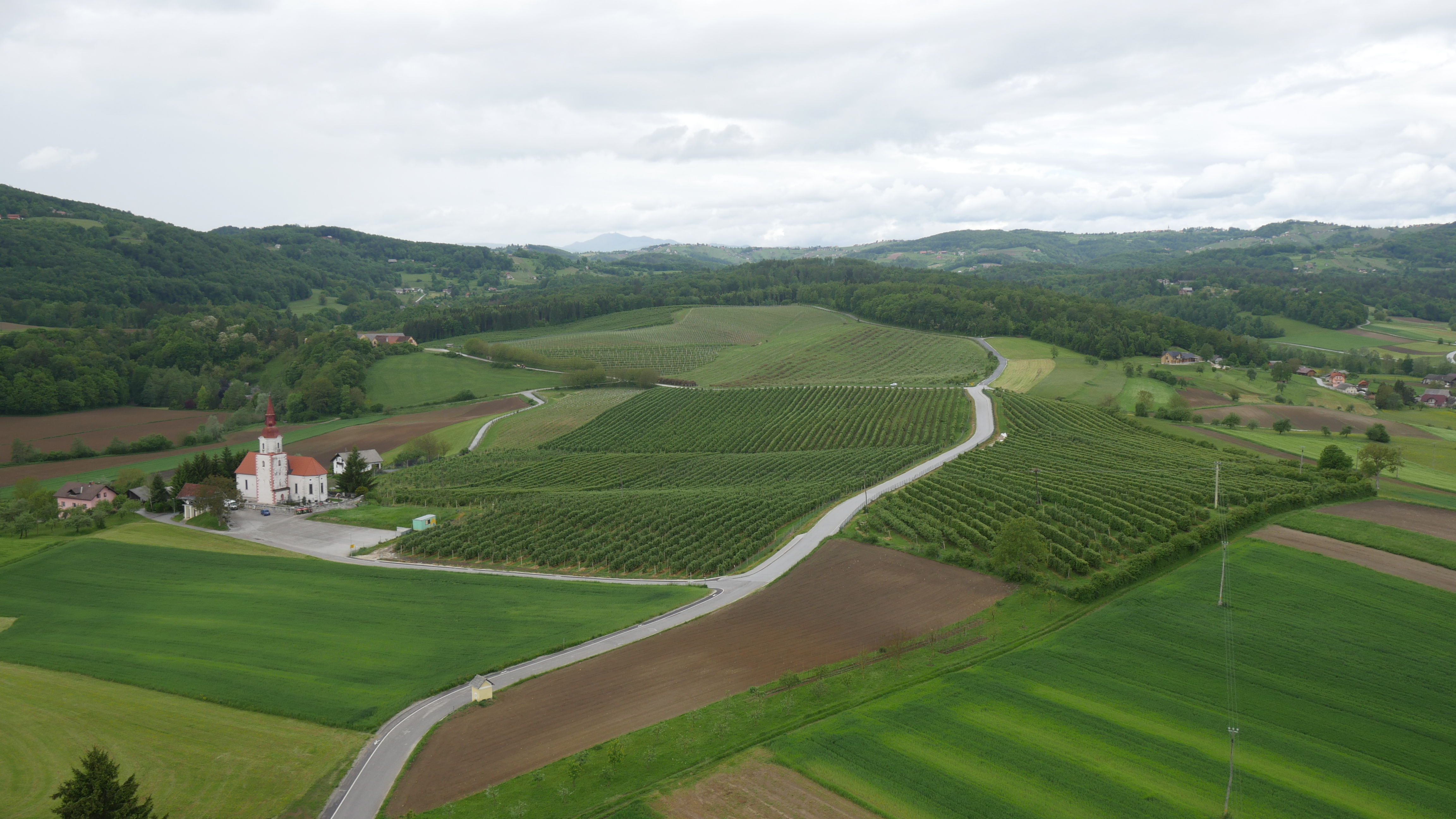 Slape